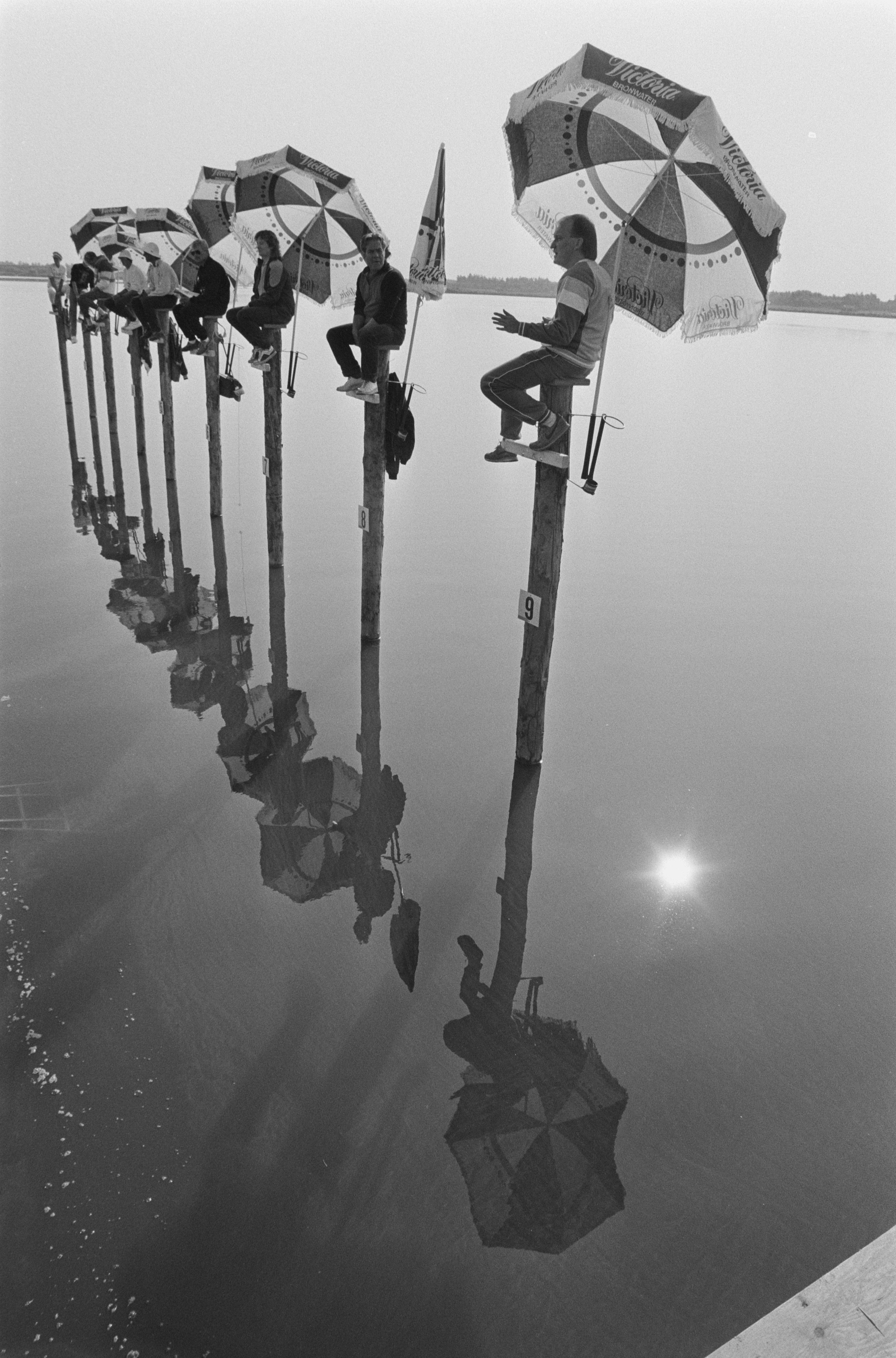 Collectie / Archief : Fotocollectie Anefo Reportage / Serie : [ onbekend ] Beschrijving : Wereldkampioenschappen paalzitten Noordwijkerhout Datum : 23 juli 1986 Locatie : Noordwijkerhout, Zuid-Holland Trefwoorden : PAALZITTEN, wereldkampioenschappen Fotograaf : Bogaerts, Rob / Anefo Auteursrechthebbende : Nationaal Archief Materiaalsoort : Negatief (zwart/wit) Nummer archiefinventaris : bekijk toegang 2.24.01.05 Bestanddeelnummer : 933-7158